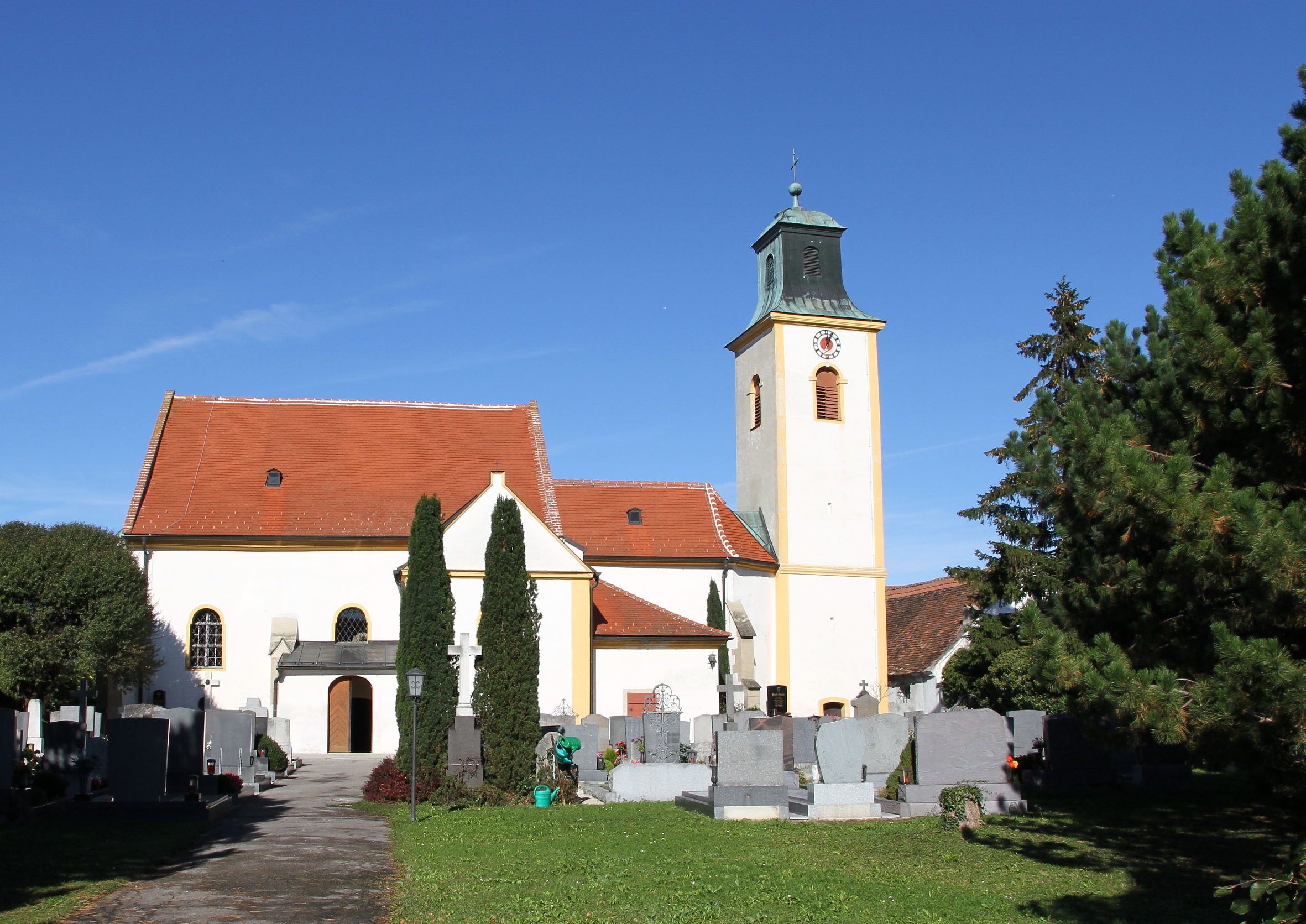 Katholische Pfarrkirche hl. Johannes d. T. in Freundorf, ein Ortsteil der niederösterreichischen Marktgemeinde Judenau-Baumgarten.